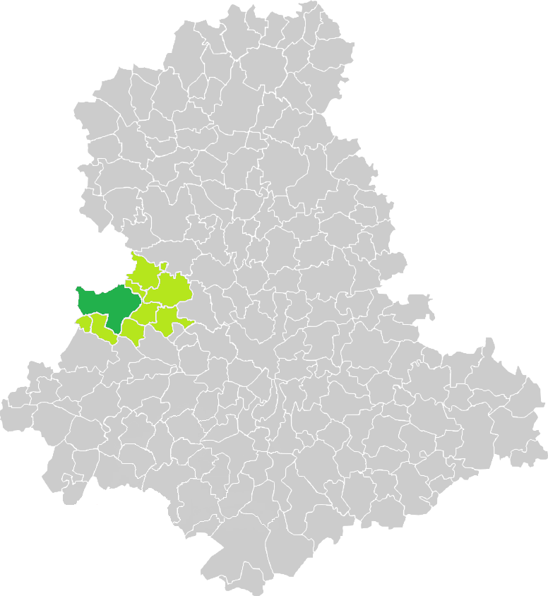 Carte de situation de la commune de Saint-Junien (en vert foncé) dans le votre Cantons (en vert clair) sur une carte des communes de la Haute-Vienne